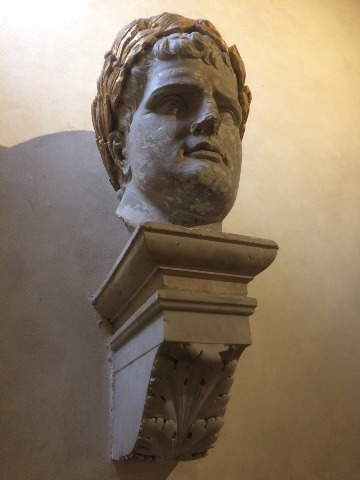 Fa parte degli unici due resti della statua colossale di Napoleone I, che si trovava sulla colonna dell'attuale Piazza Ariostea di Ferrara tra il 1810 e il 1814. Attualmente è conservata presso il Museo di Casa Romei a Ferrara.